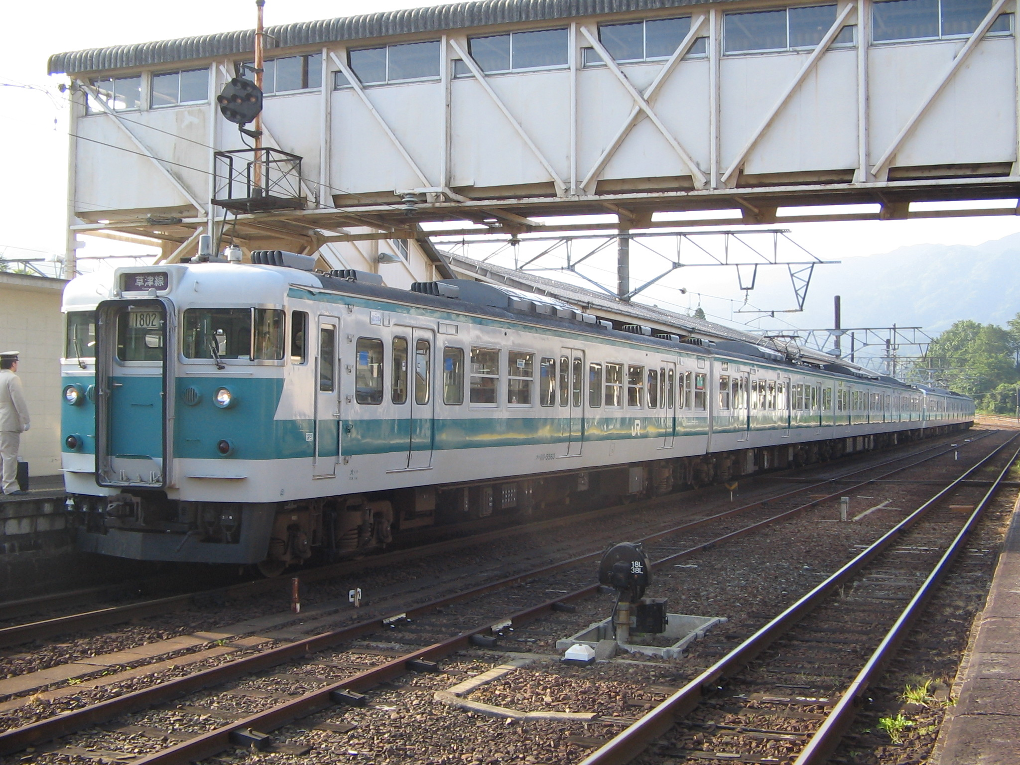 JR西日本福知山線脱線事故に関連して草津線に入線した113系阪和線色． 草津線では、8両運用のダイヤに入ったため、4+4の編成となった． 2005年6月6日 草津線柘植駅にて 投稿者(寝台特急なは号)撮影